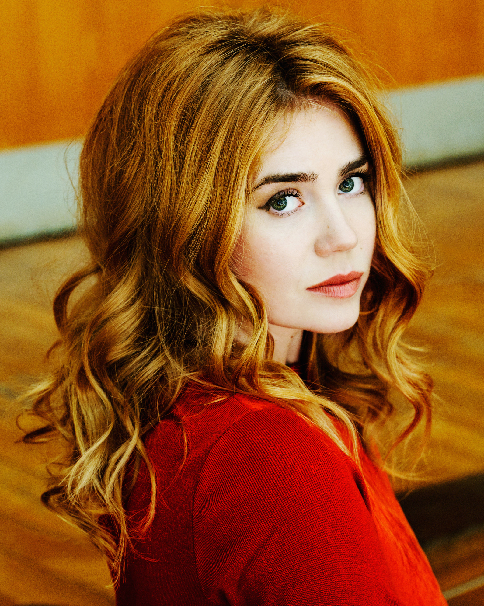 Palina Rojinski c. Jeanne Degraa